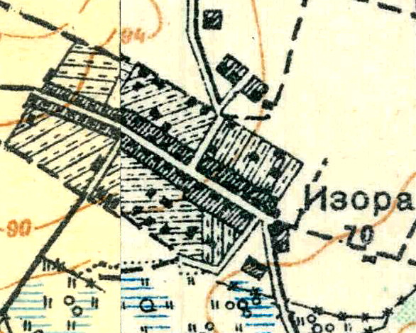 Топографическая карта Ленинградской области, квадрат О-36-25-А-б (Дружная Горка), деревня Изора